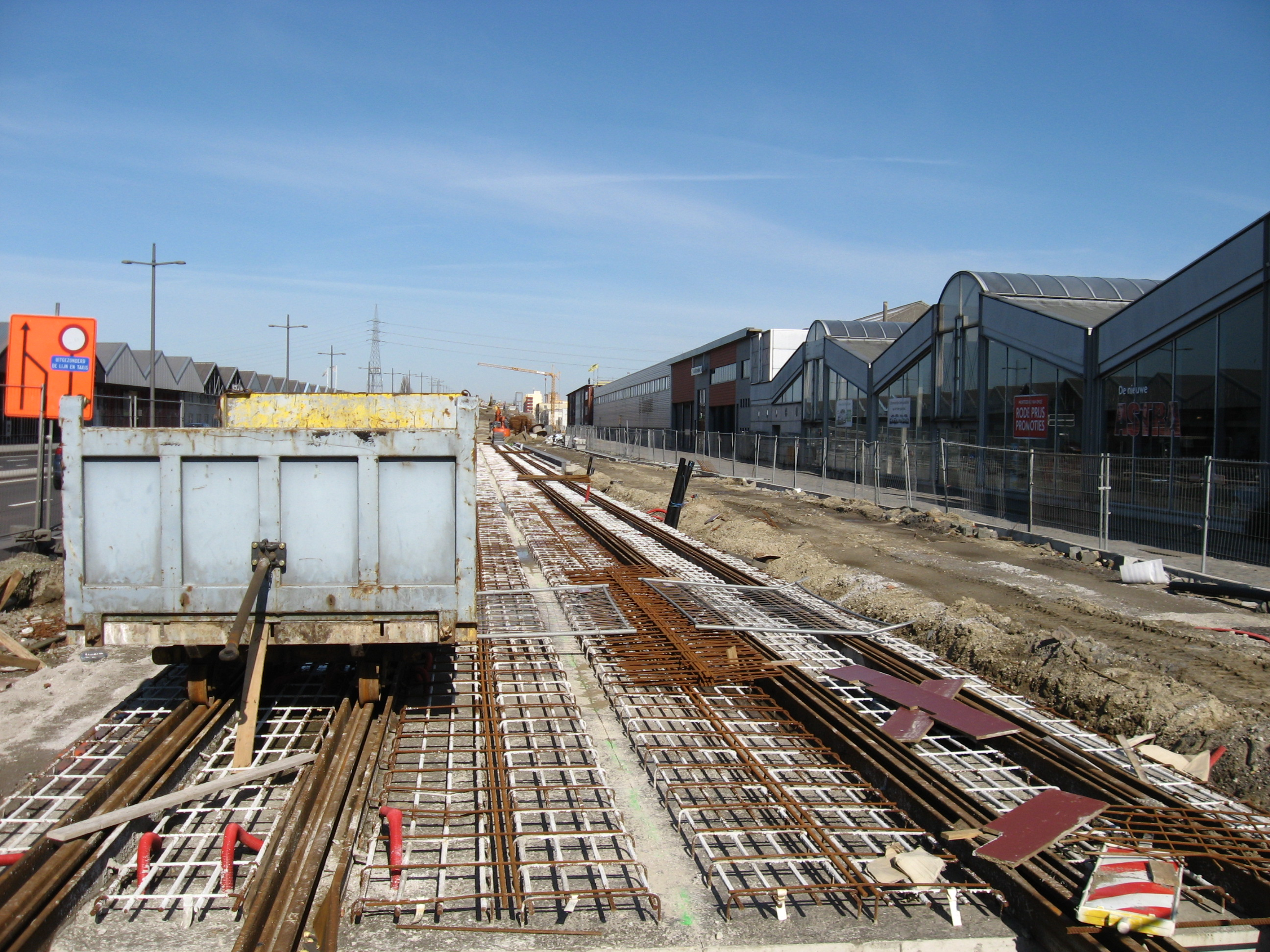 De nieuwe brug van de Noorderlaan voor de tram. rails worden gelegd.